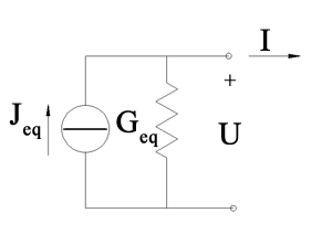 autore: Len zuò descrizione: generatore di corrente equivalente, teorema di Northon